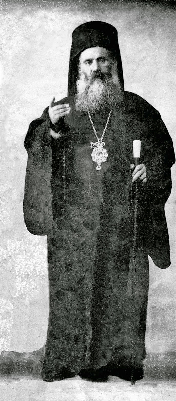 Αγ. Χρυσόστομος Σμύρνης